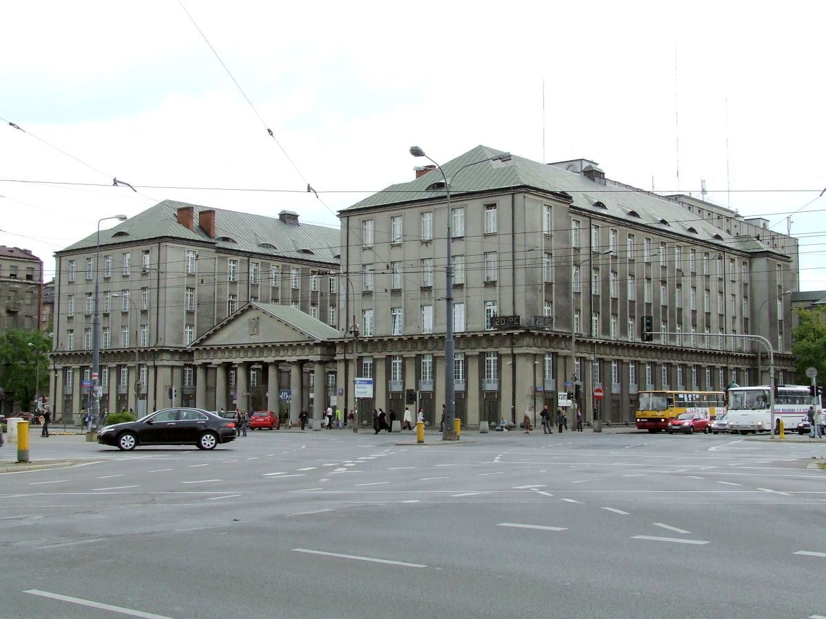 Gmach dyrekcji PKP. proj. Marian Lalewicz